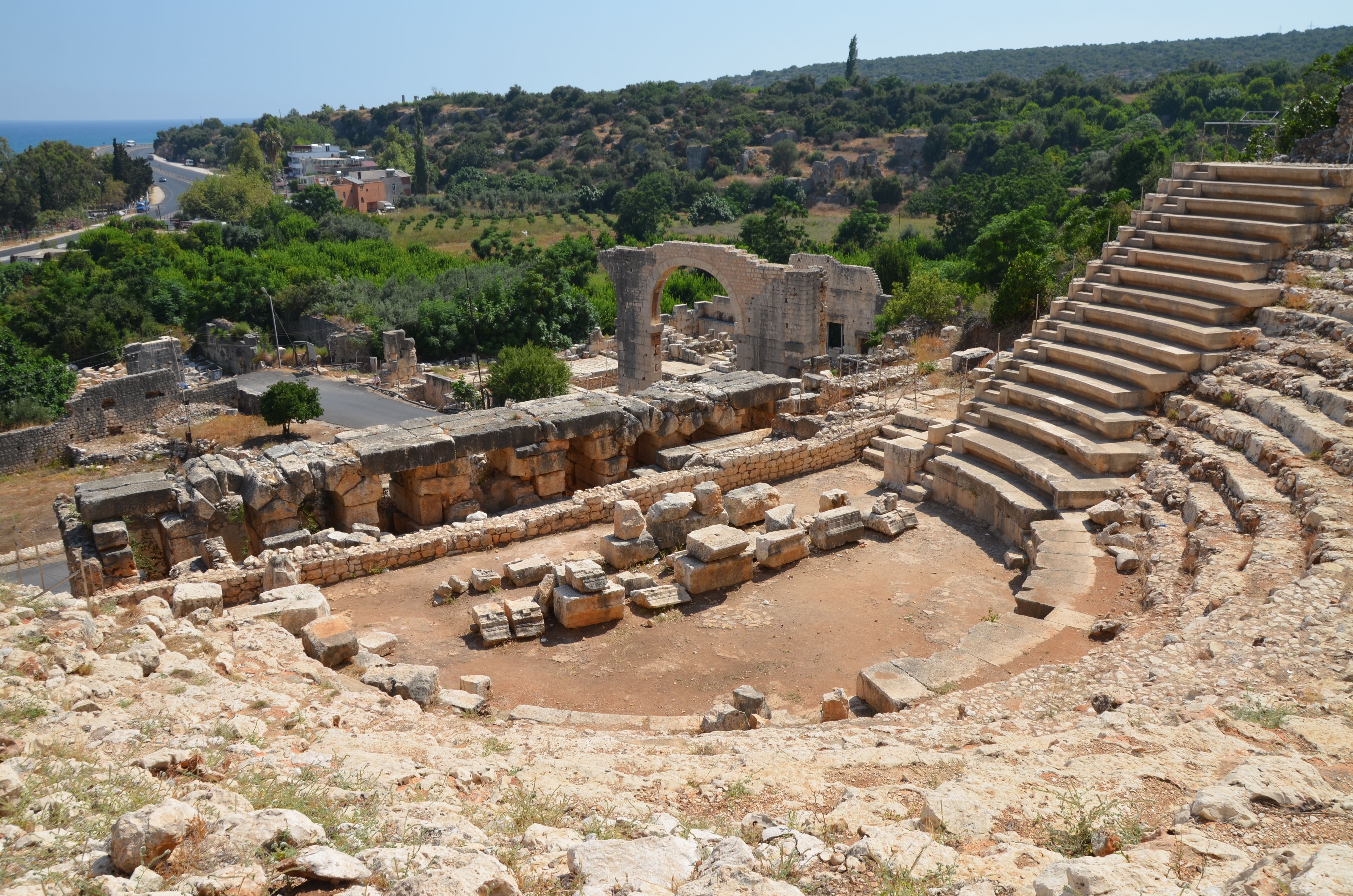 Elaiussa Sebaste, Cilicia, Turkey